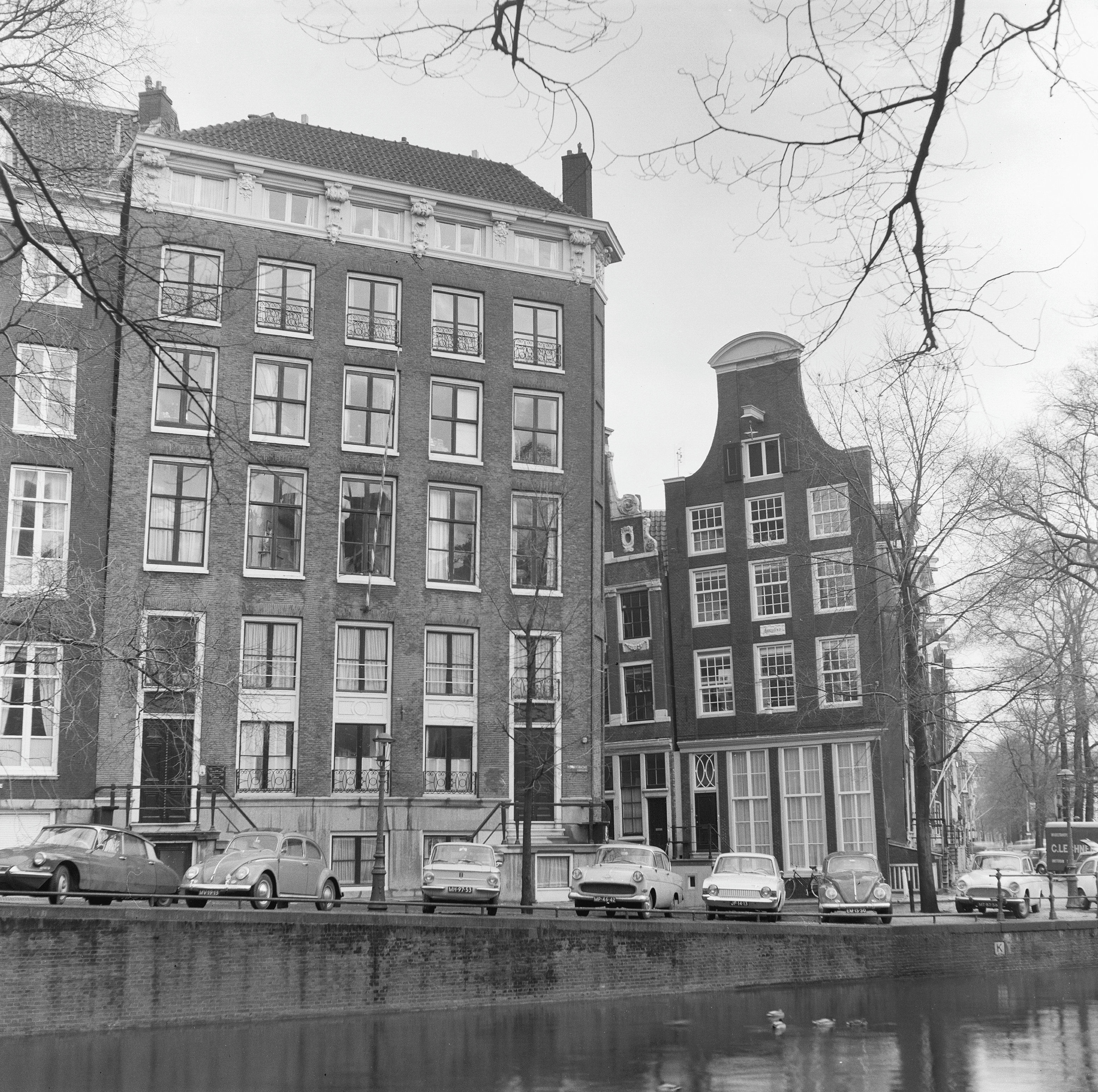 voorgevel